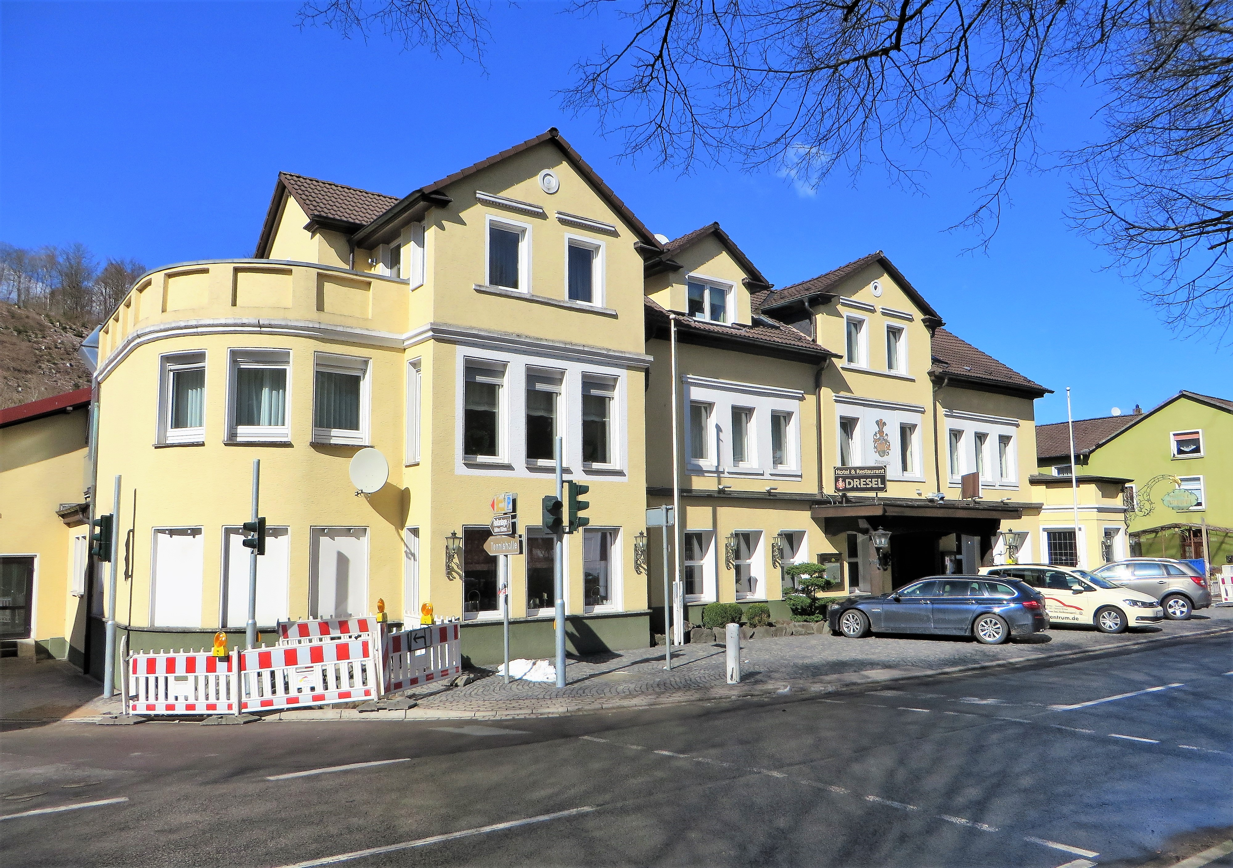 Hotel & Restaurant Dresel (seit 1901) in Hagen-Rummenohl, Rummenohler Straße 31.